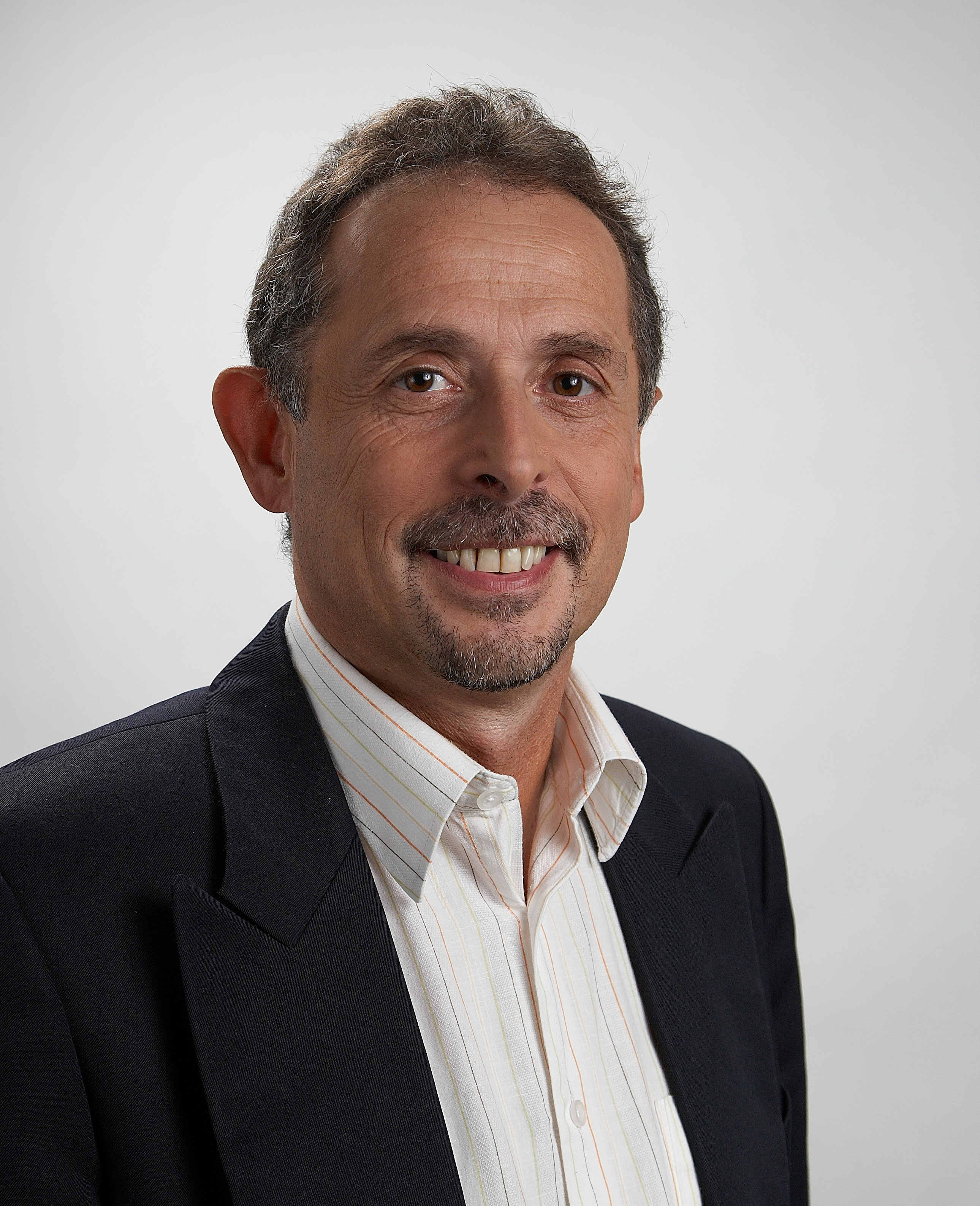 Václav Horáček, poslanec PSP ČR